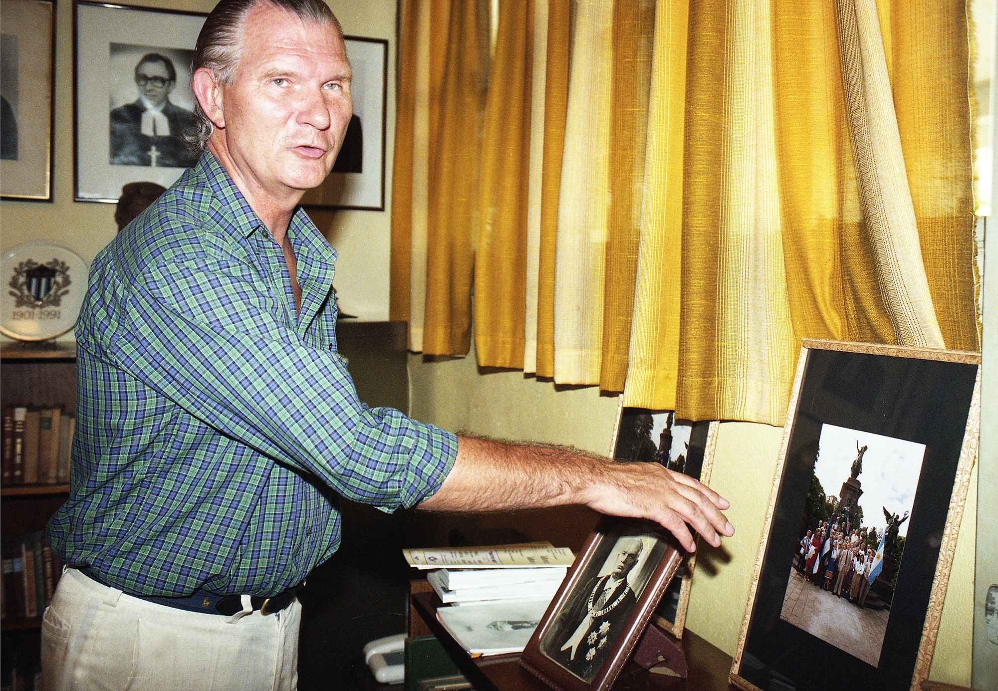 Peet Pullisaar, Eesti aukonsul Argentinas (1994-2007) 97